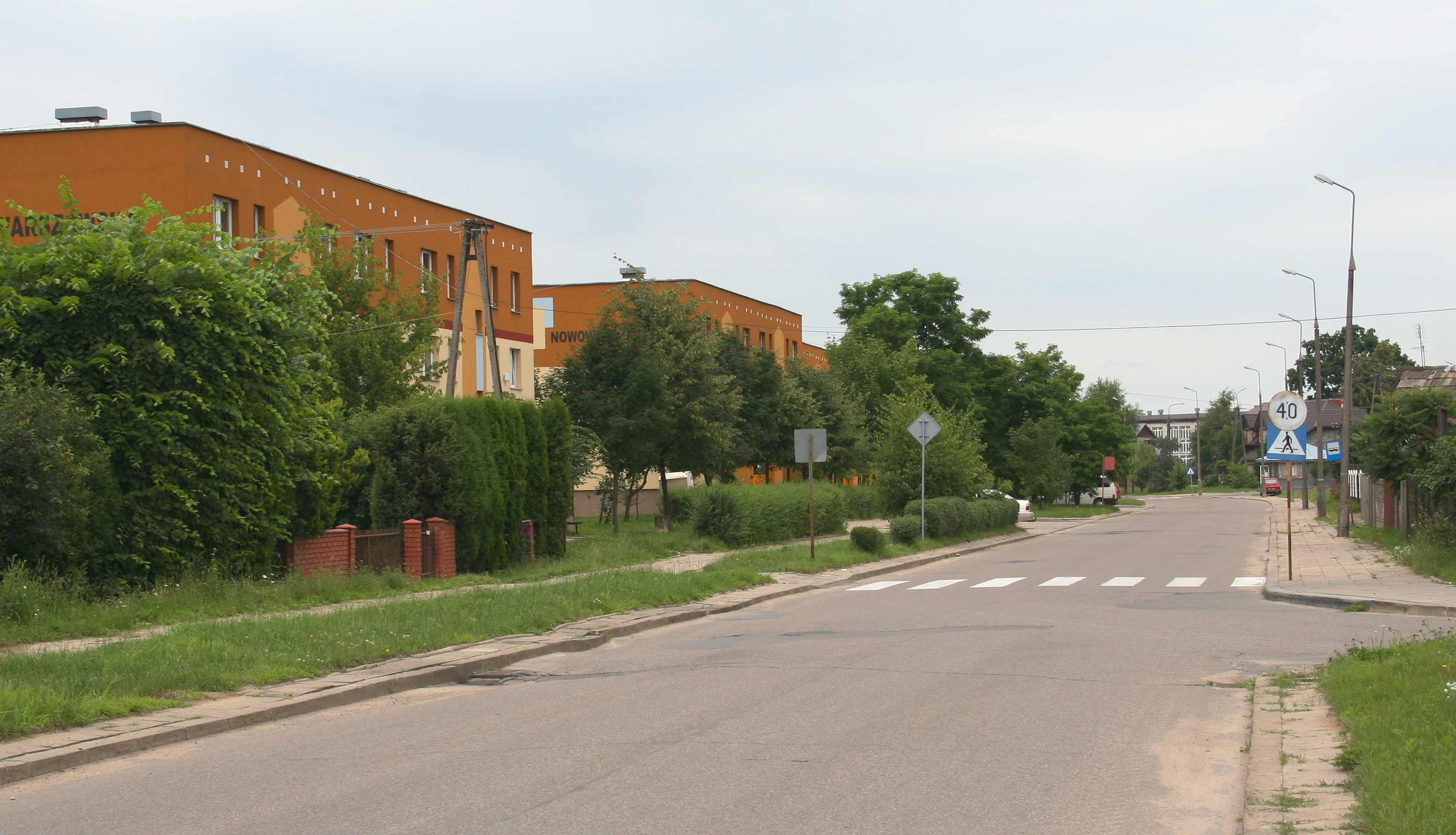 Ulica Nowowarszawska w Hajnówce